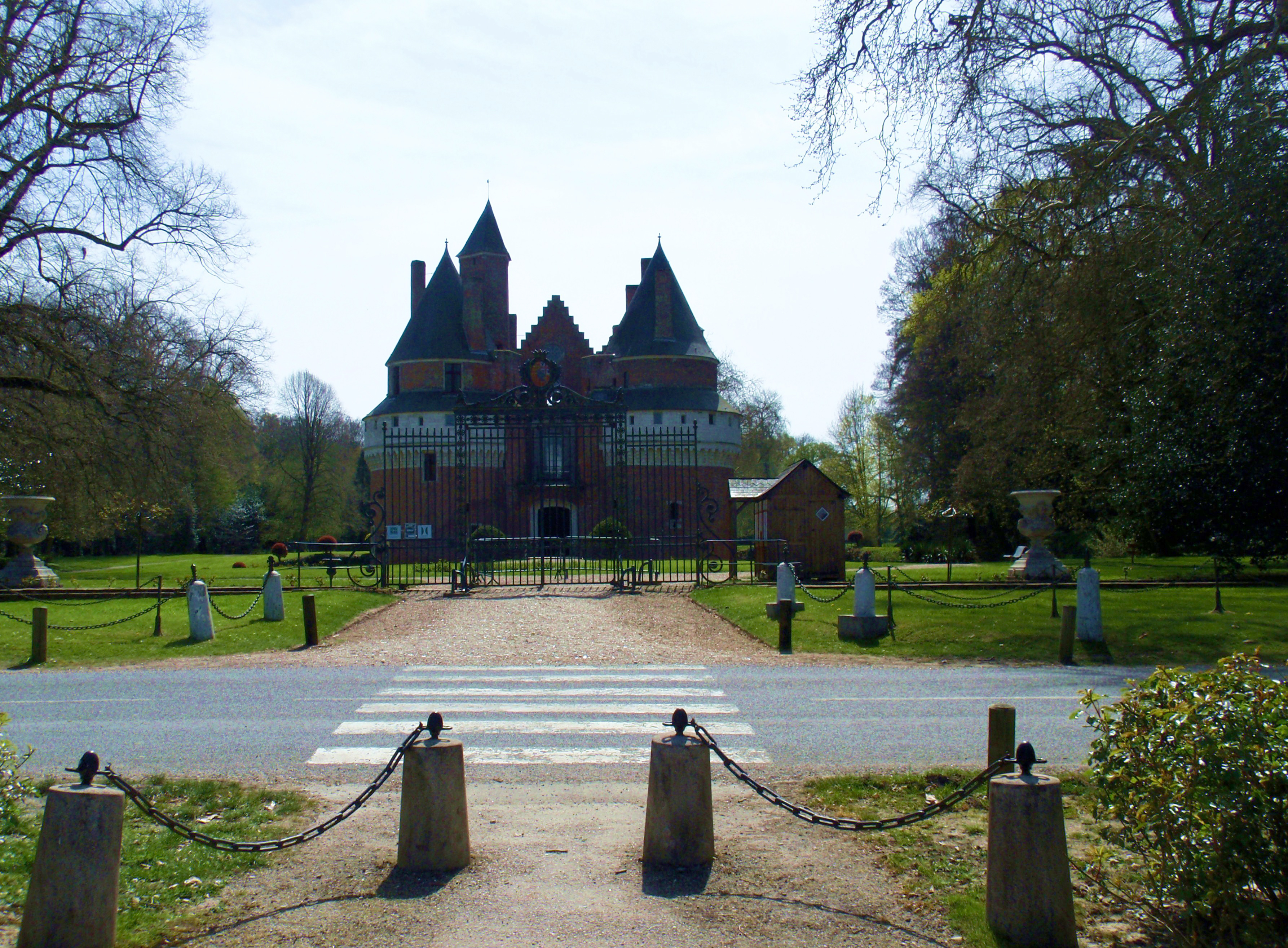 Rambures (Somme, France). Le château, vu depuis le parking d'en face, de l'autre côté de la rue.